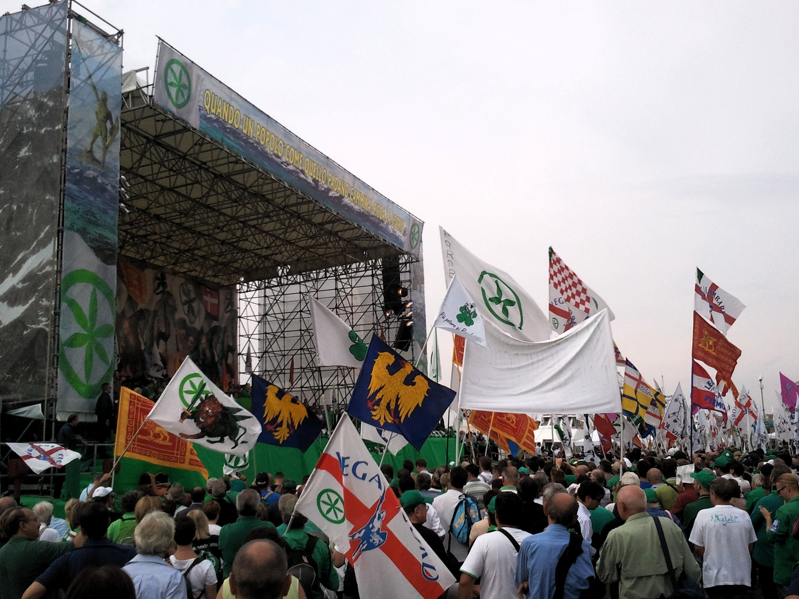 Sostenitori della Lega Nord alla festa dei popoli padani a Venezia.